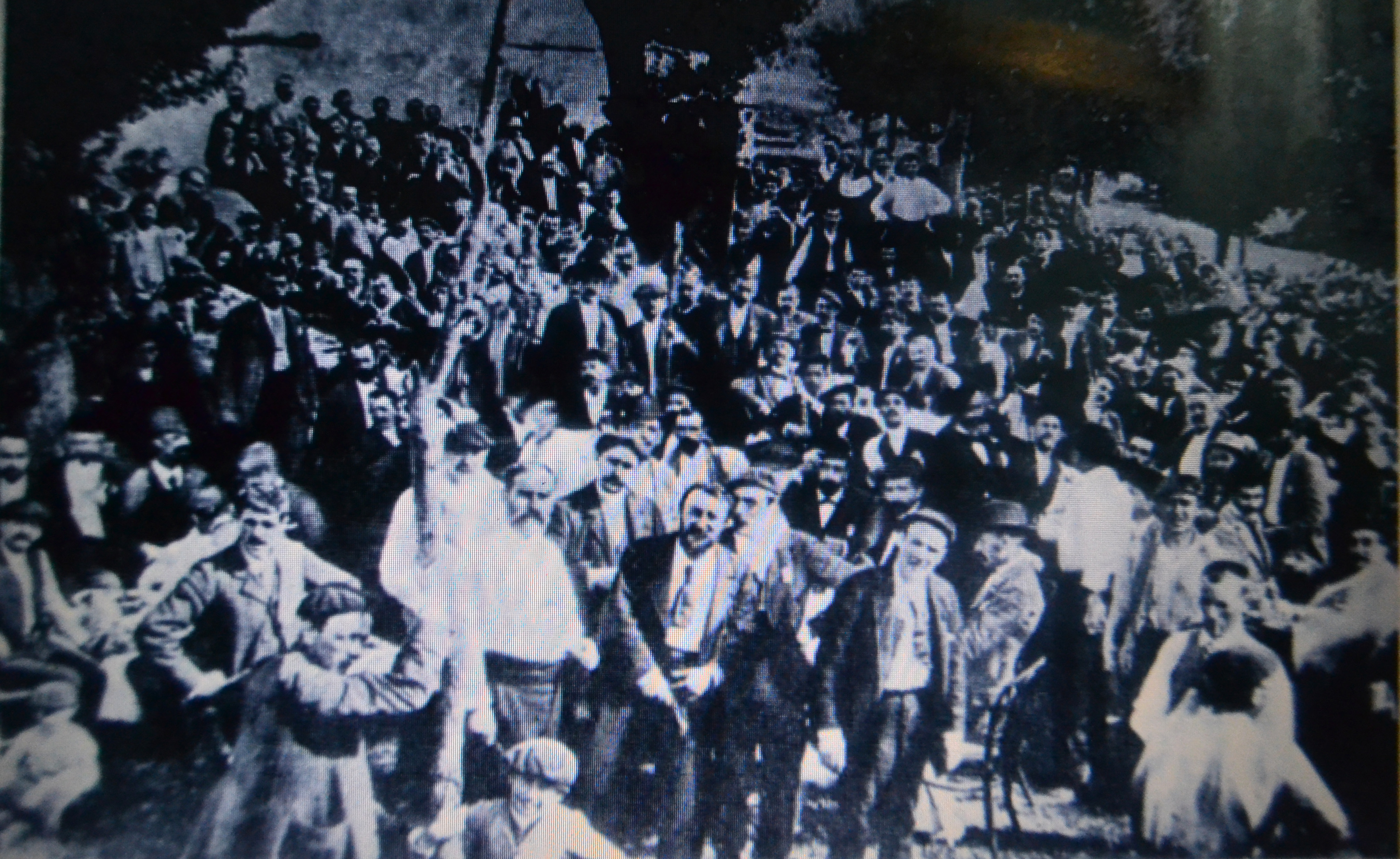 Sanrokada, 1893. Gernika, Bizkaia. Euskal Herria. Sanrokada, 1893. Gernika, Bizkaia. Basque Country.